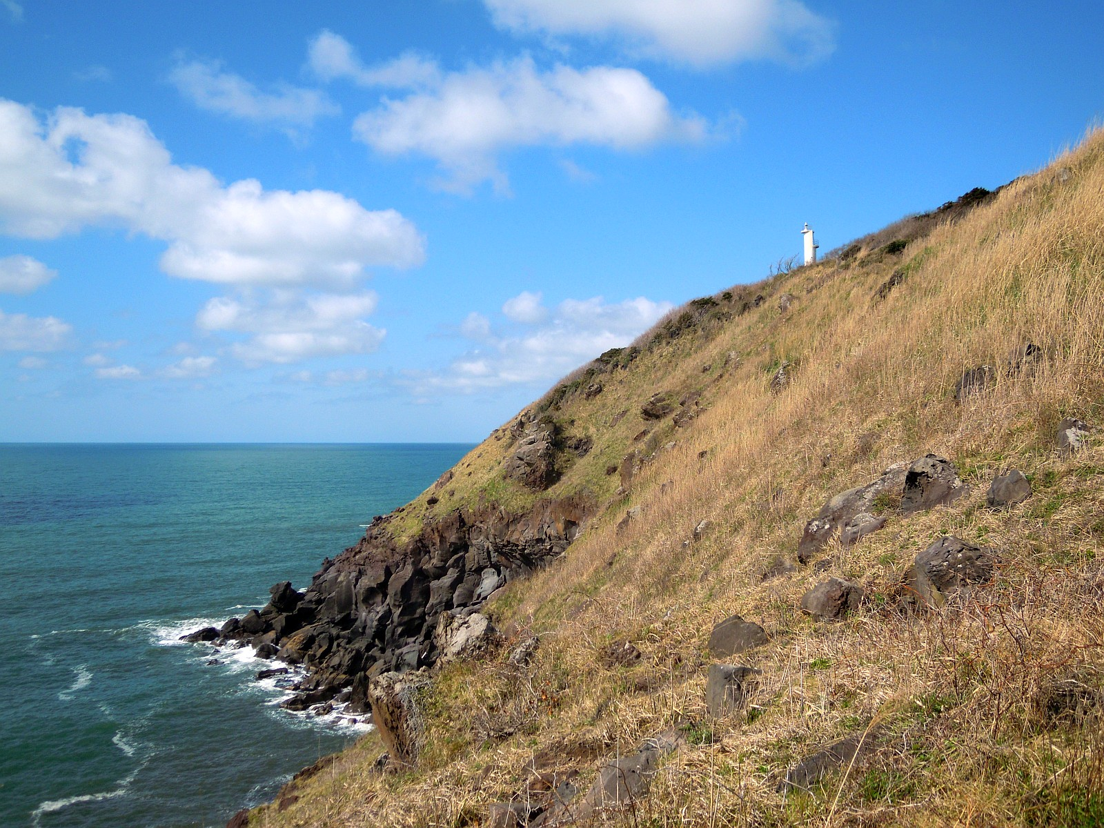 秋田県にかほ市と山形県飽海郡遊佐町に跨る三崎公園内から大師崎を遠望斜面中腹に見えるのは羽後三埼灯台